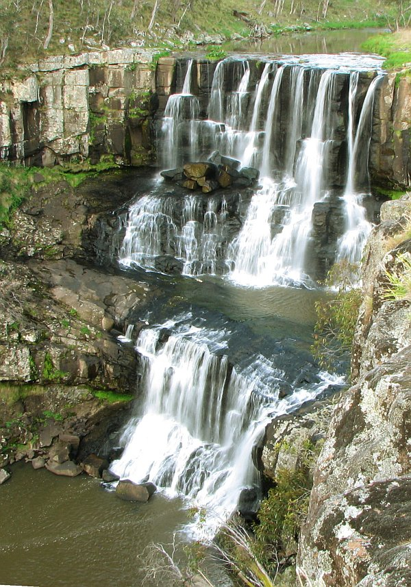 Upper Ebor Falls